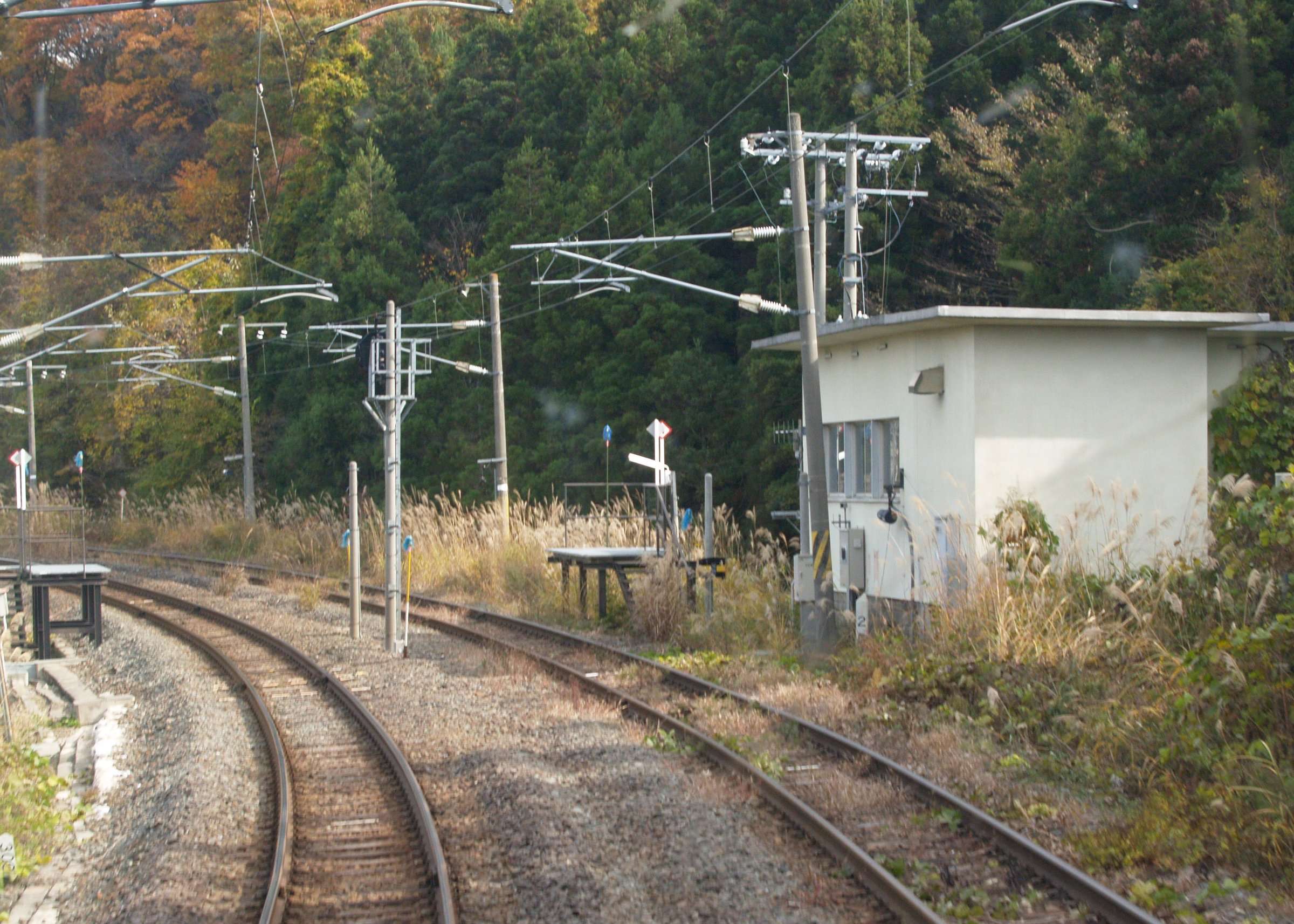 沼上信号場（構内の様子。郡山行列車の先頭から撮影）